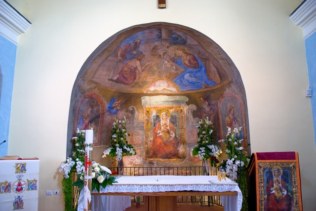 Nell'abside un affresco databile al XI sec. Wikipedia: Villa di Briano; Briano.